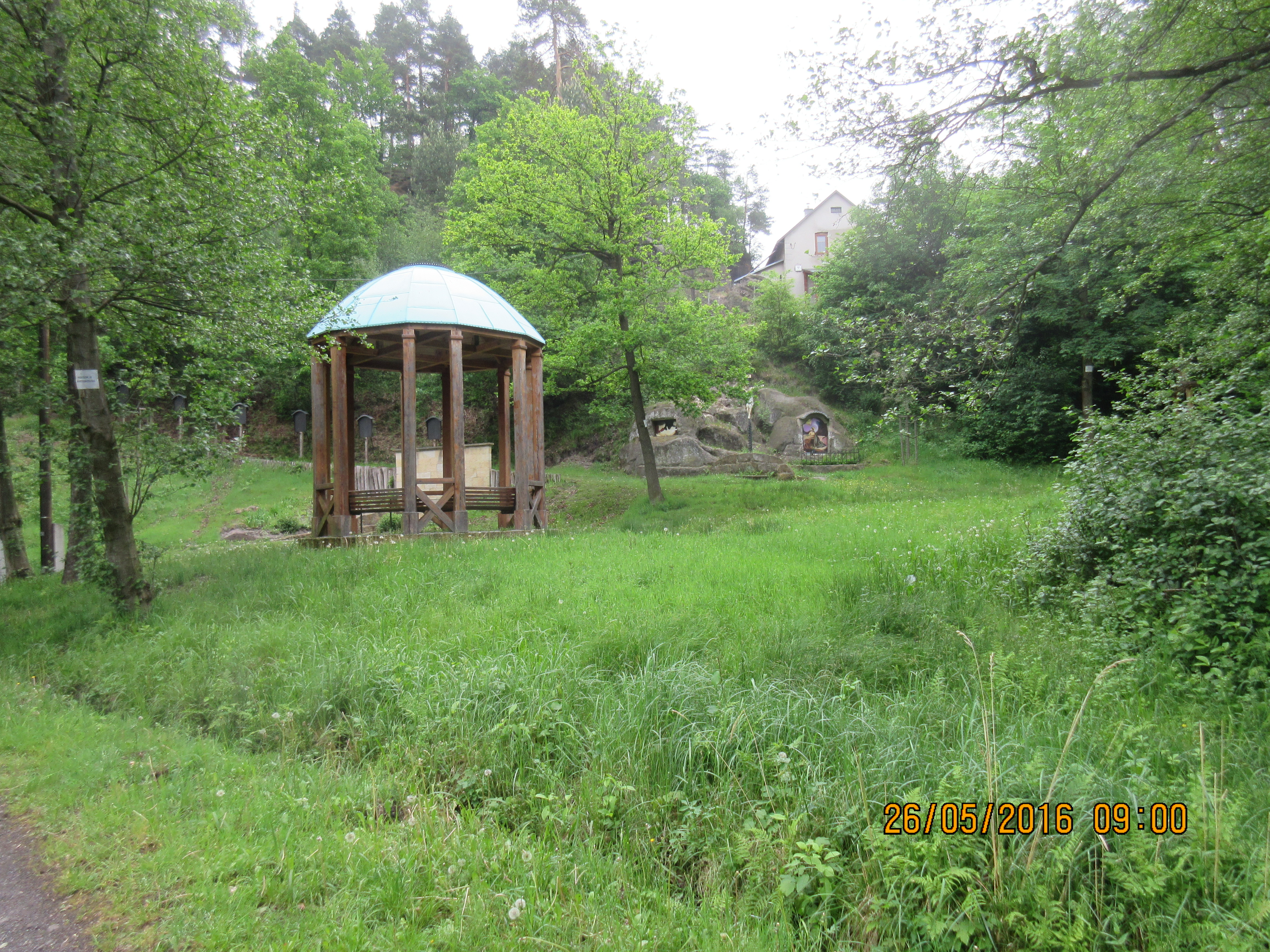 Altán, za ním pramen, vstupní část Křížové cesty u Kamenického Šenova